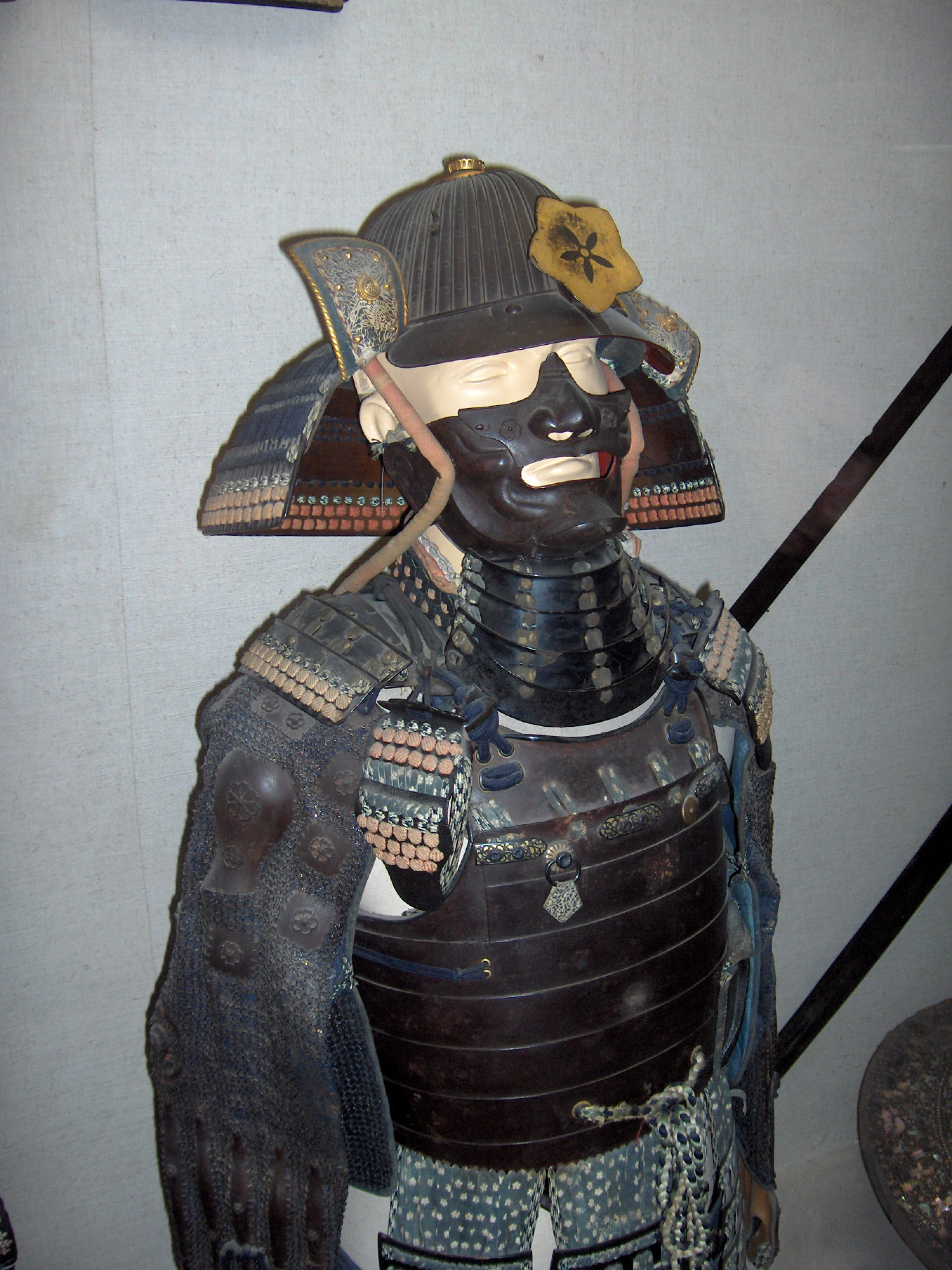 Samurai armour; gift to sultan Abdülhamit II in 1891; Topkapı Palace, Istanbul, Turkey